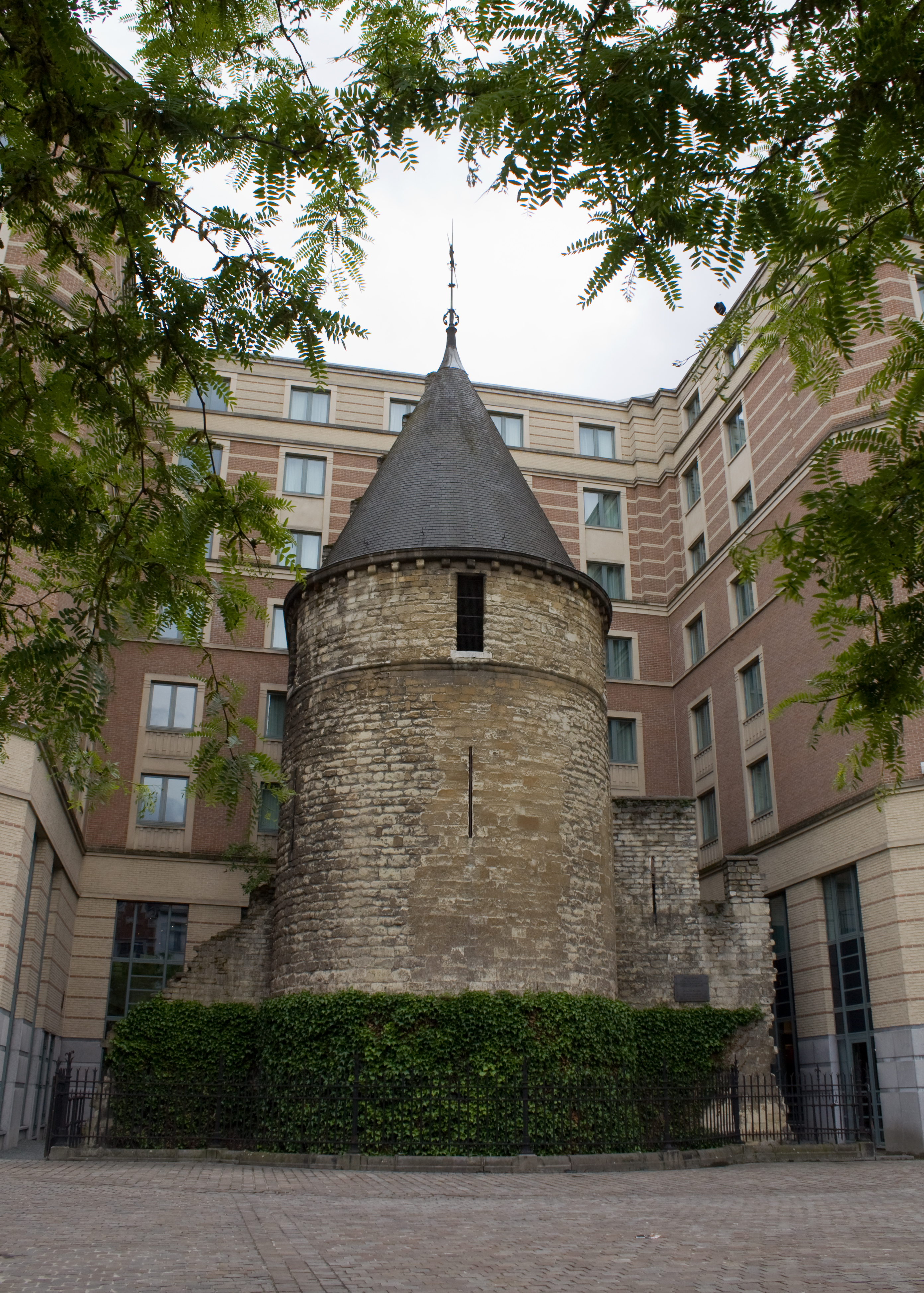 De Zwarte Toren, behorende tot de 1e stadsomwalling van Brussel